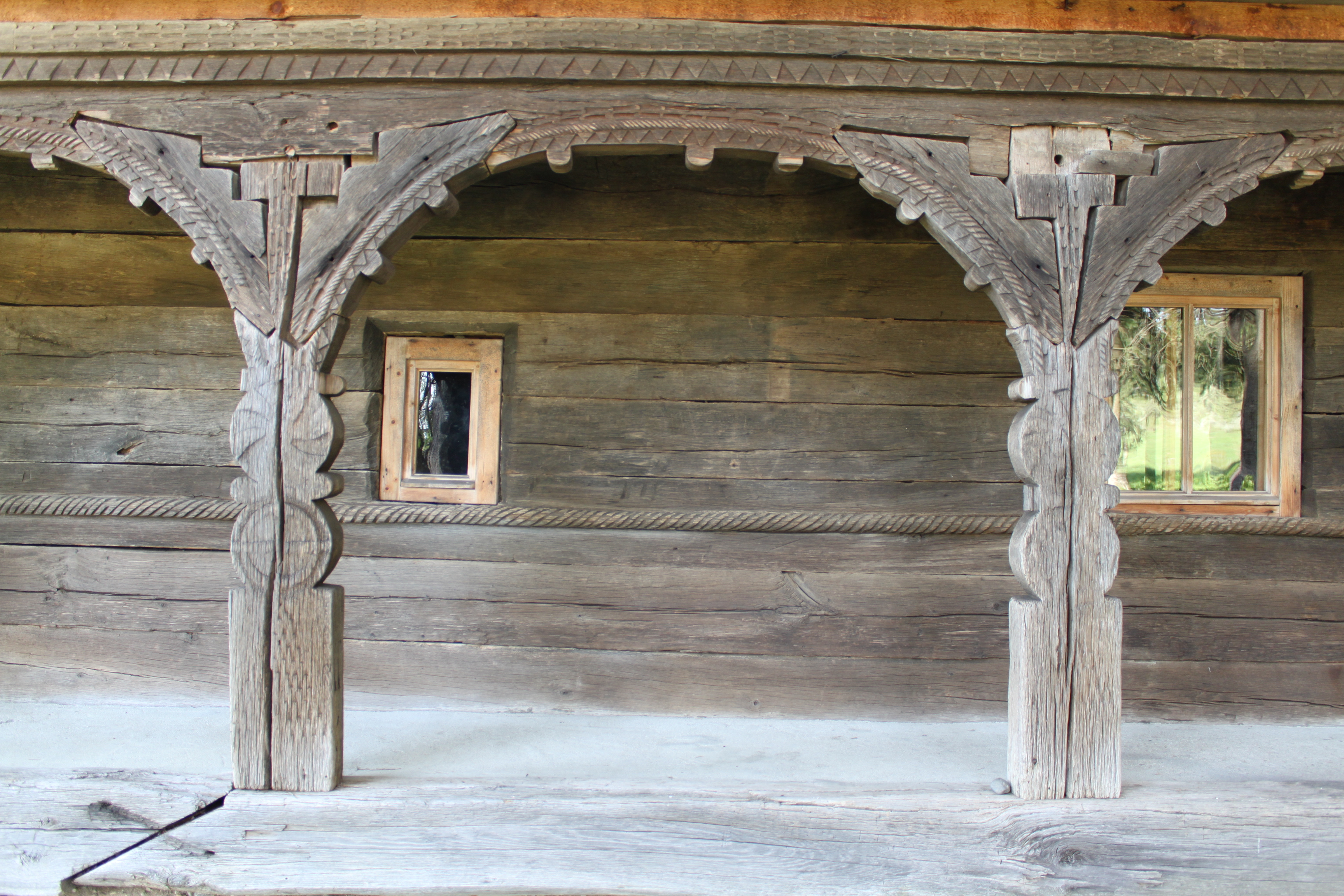 biserica de lemn din Subpiatră, judeţul Bihor.